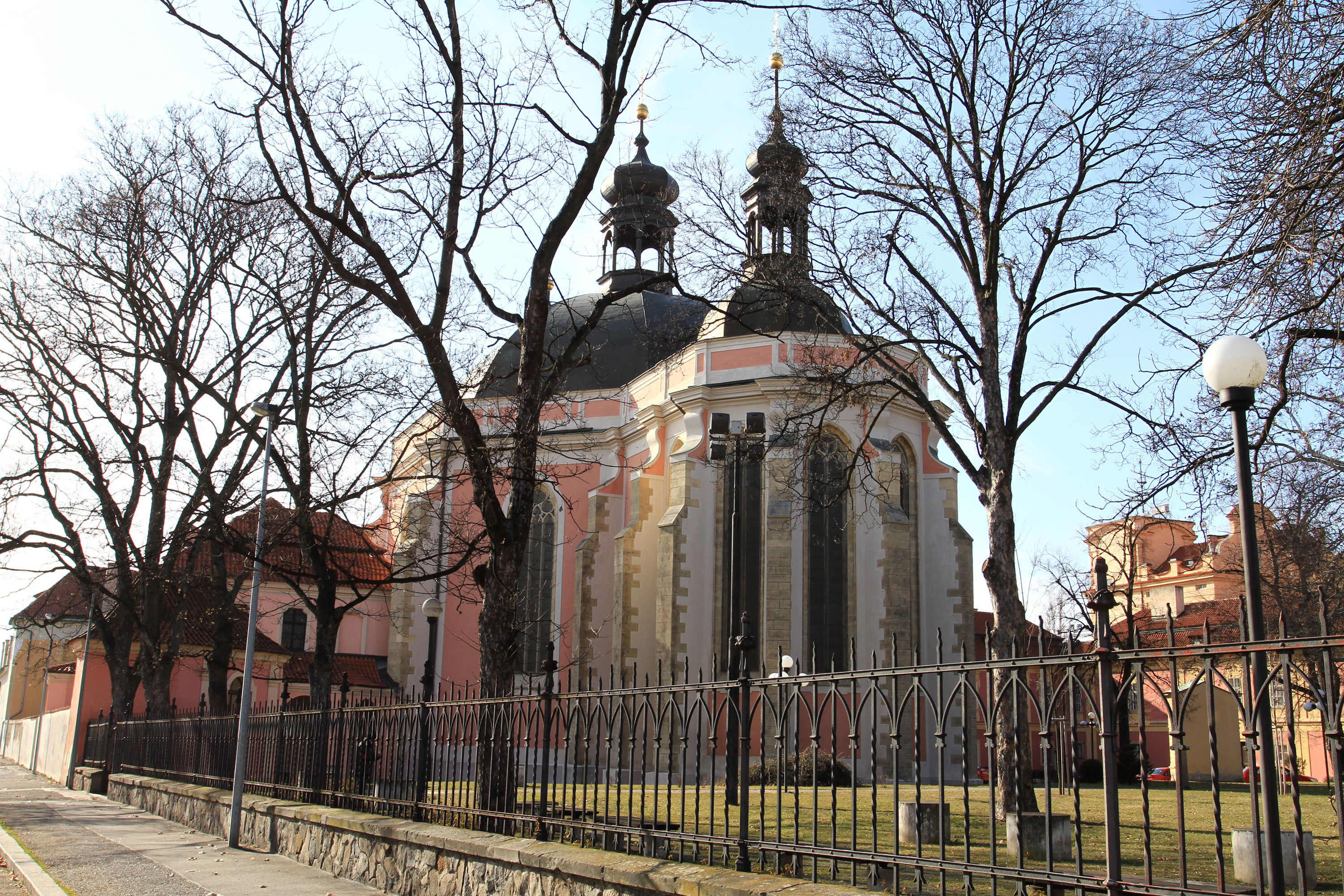 Klášter augustiniánů kanovníků (Nové Město), Praha 2-Nové Město, Ke Karlovu 453/1, Boženy Němcové 453/2, Sokolská 453/1, Horská 453/7